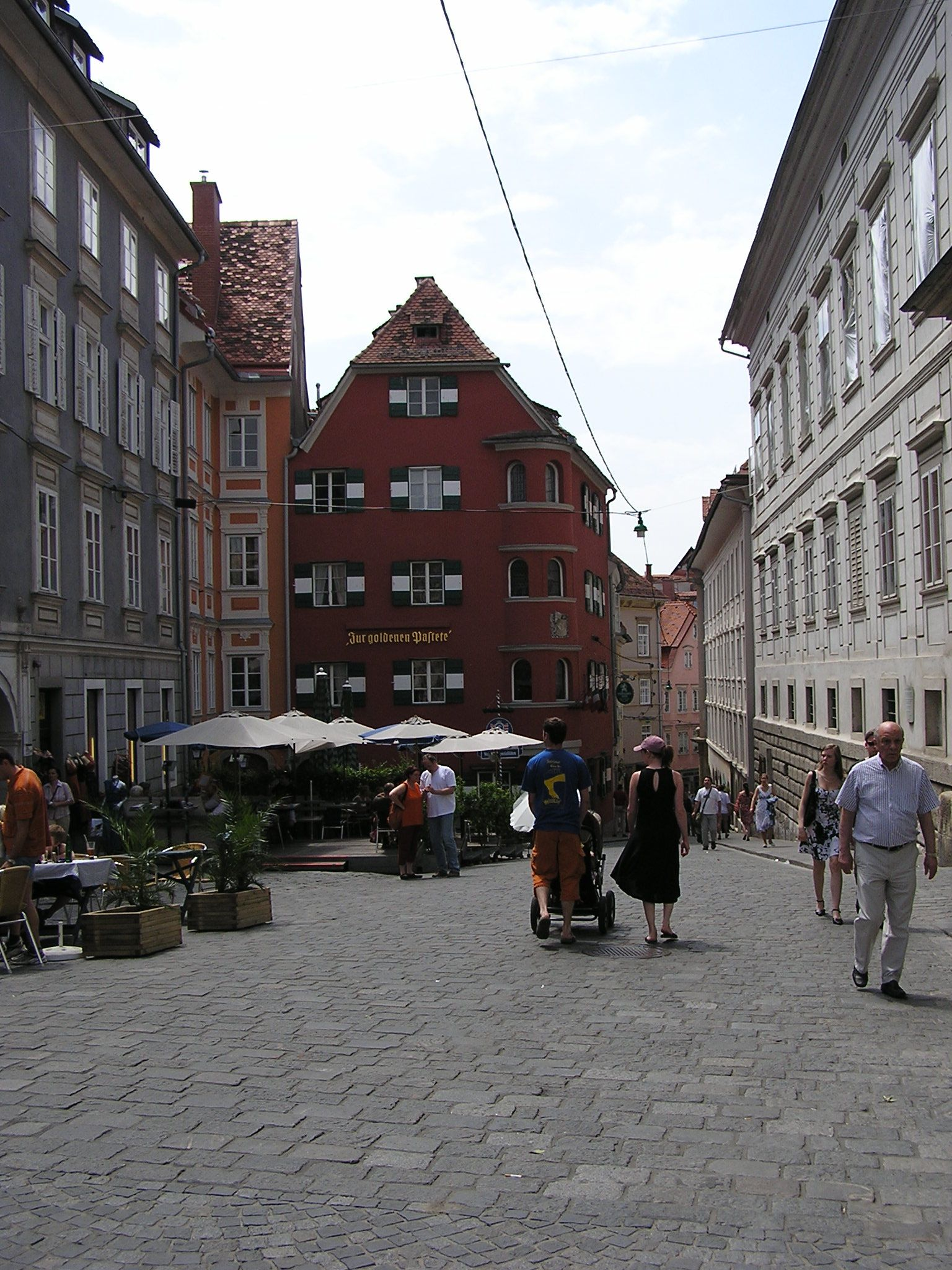 Abschnitt der Sporgasse